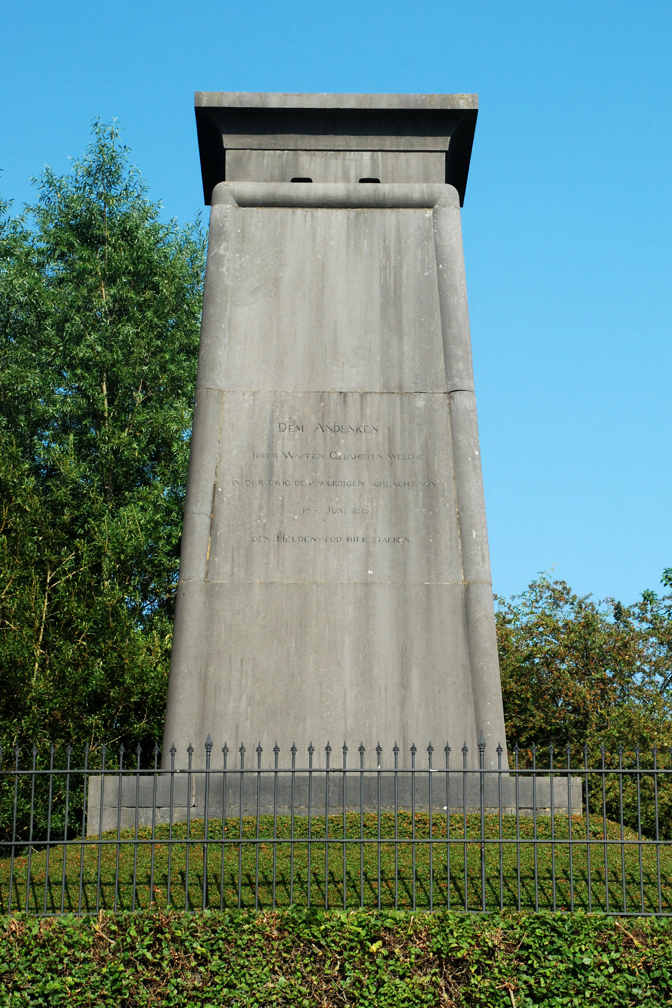 Belgique - Brabant wallon - Monument aux Hanovriens